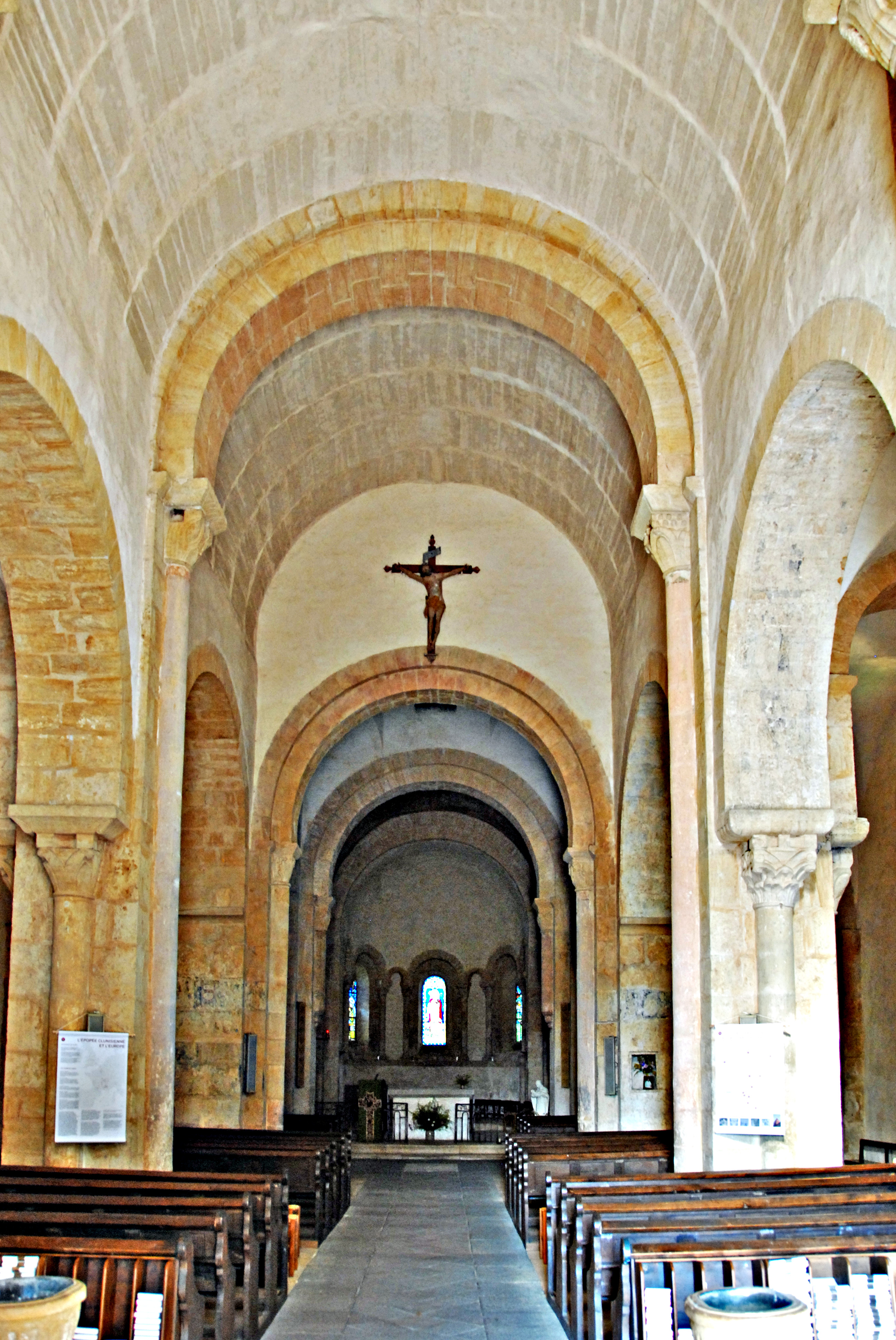 St-André d'Iguerande, Mittelschiff zum Chor